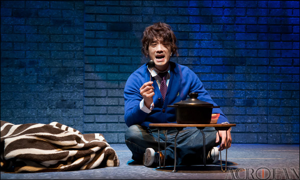 뮤지컬 위대한 캐츠비 프레스 콜